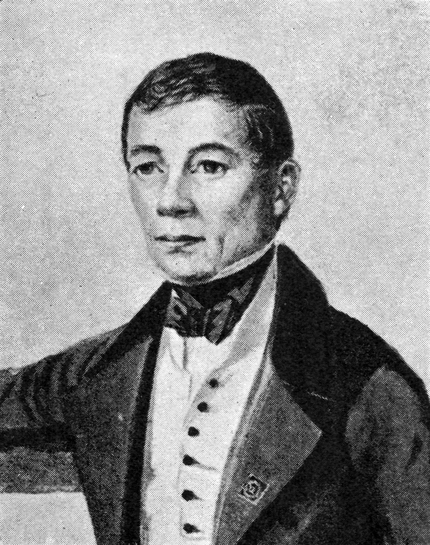 Anders Fredrik Granstedt.